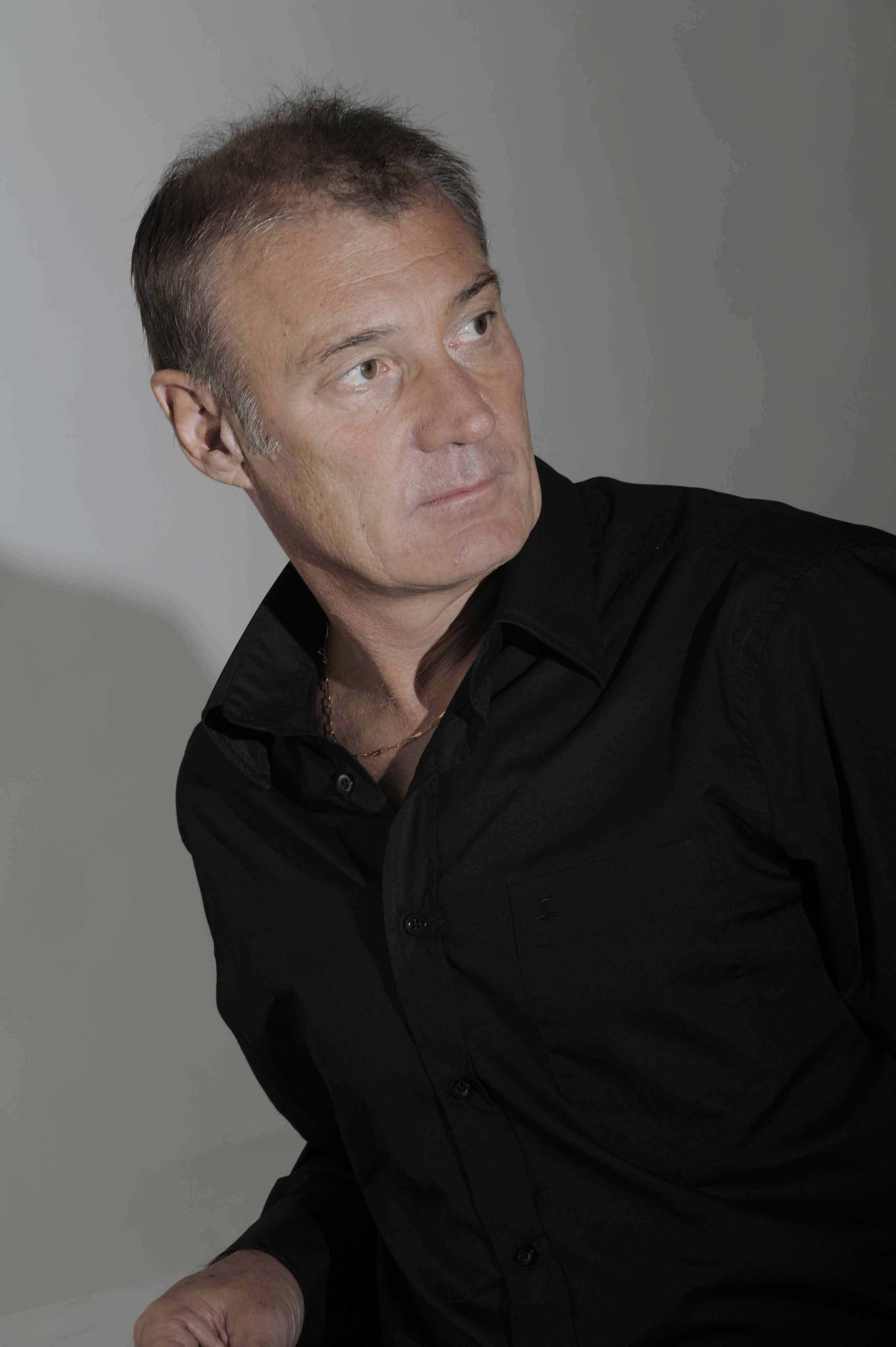 acteur-metteur en scène français